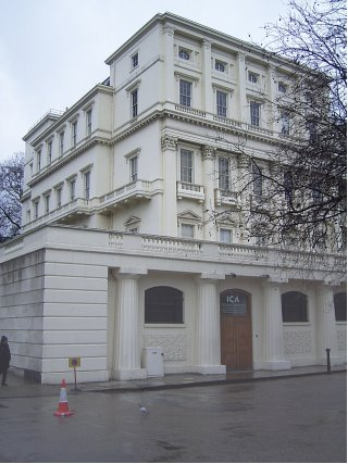 Institute of Contemporary Arts in London 2004 Author: Denis Barthel GNU Freie Dokumentationslizenz